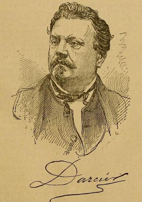 Portrait de Joseph Darcier.